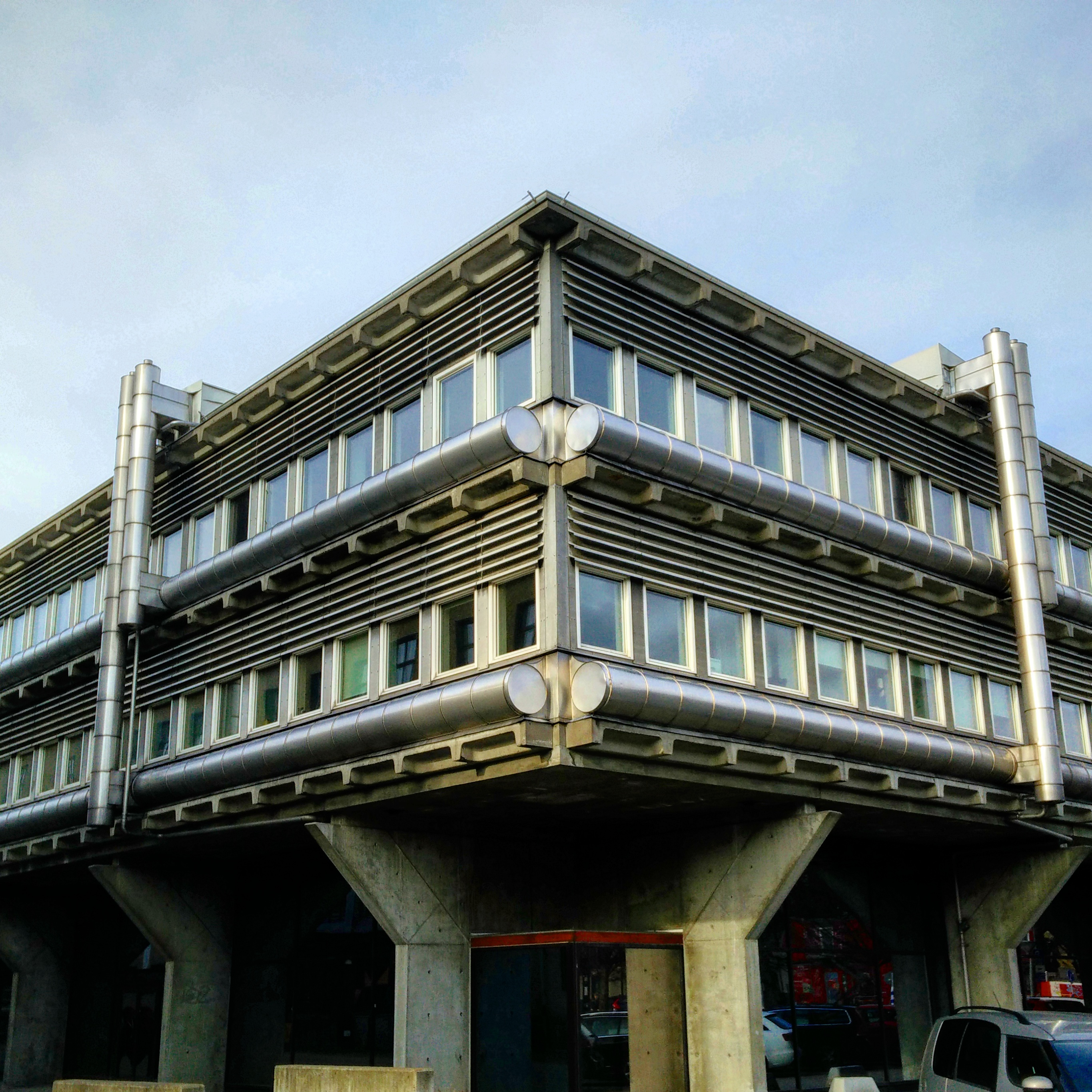 Polisstation på Drottninggatan 18 i Malmö.